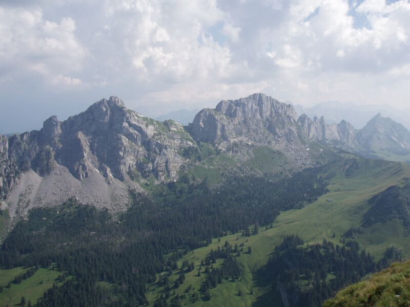 Blick von der Hochmatt zur Gastlosenkette: Dent de Ruth (links), Dent de Savigny (Mitte rechts), in der Folge Les Pucelles und Rochers des Rayes